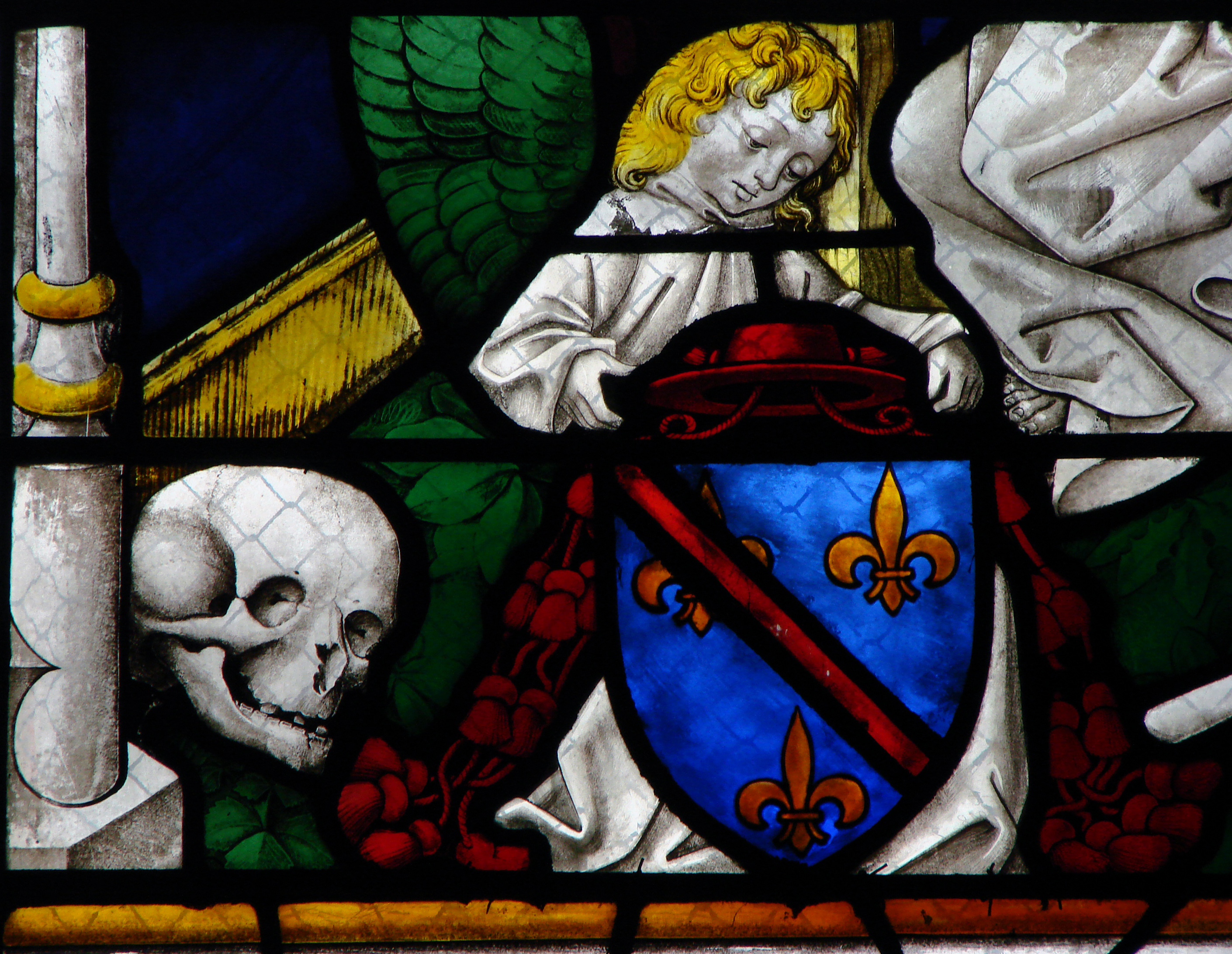 Basilique-cathédrale Notre-Dame de l'Annonciation de Moulins; vitrail du Crucifiement (sic),fin du 15ème siècle. Détail: le crâne au pied de la Croix.